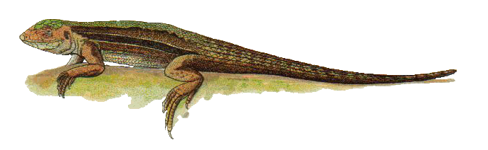 Kentropyx striata from NIE